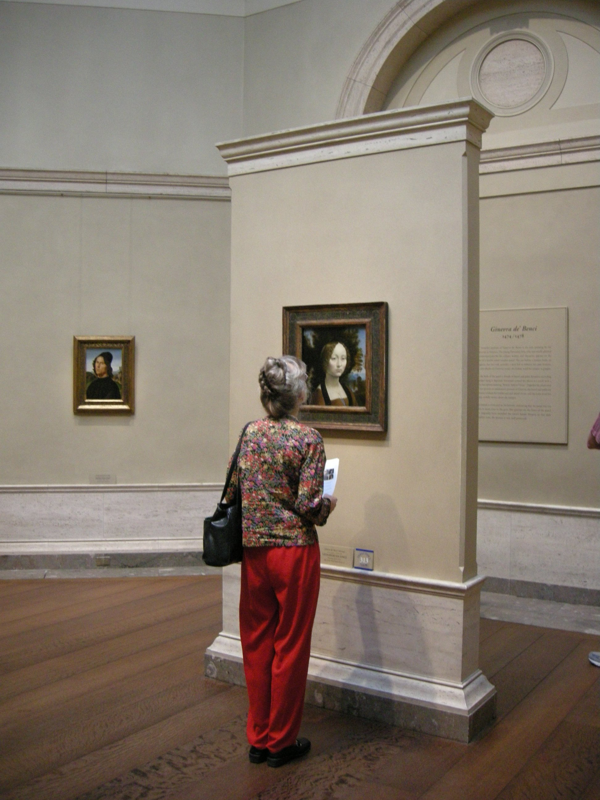 Nga, ritratto di ginevra de' benci, proporzioni Nga, ritratto di ginevra de' benci, proporzioni